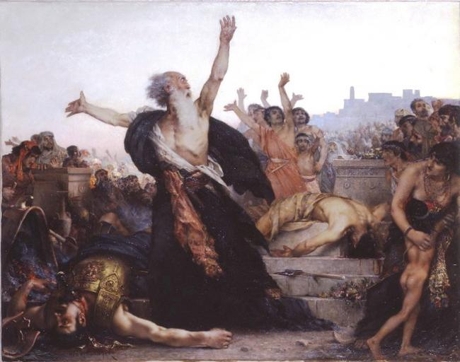 Mattathias refuse de sacrifier aux idoles